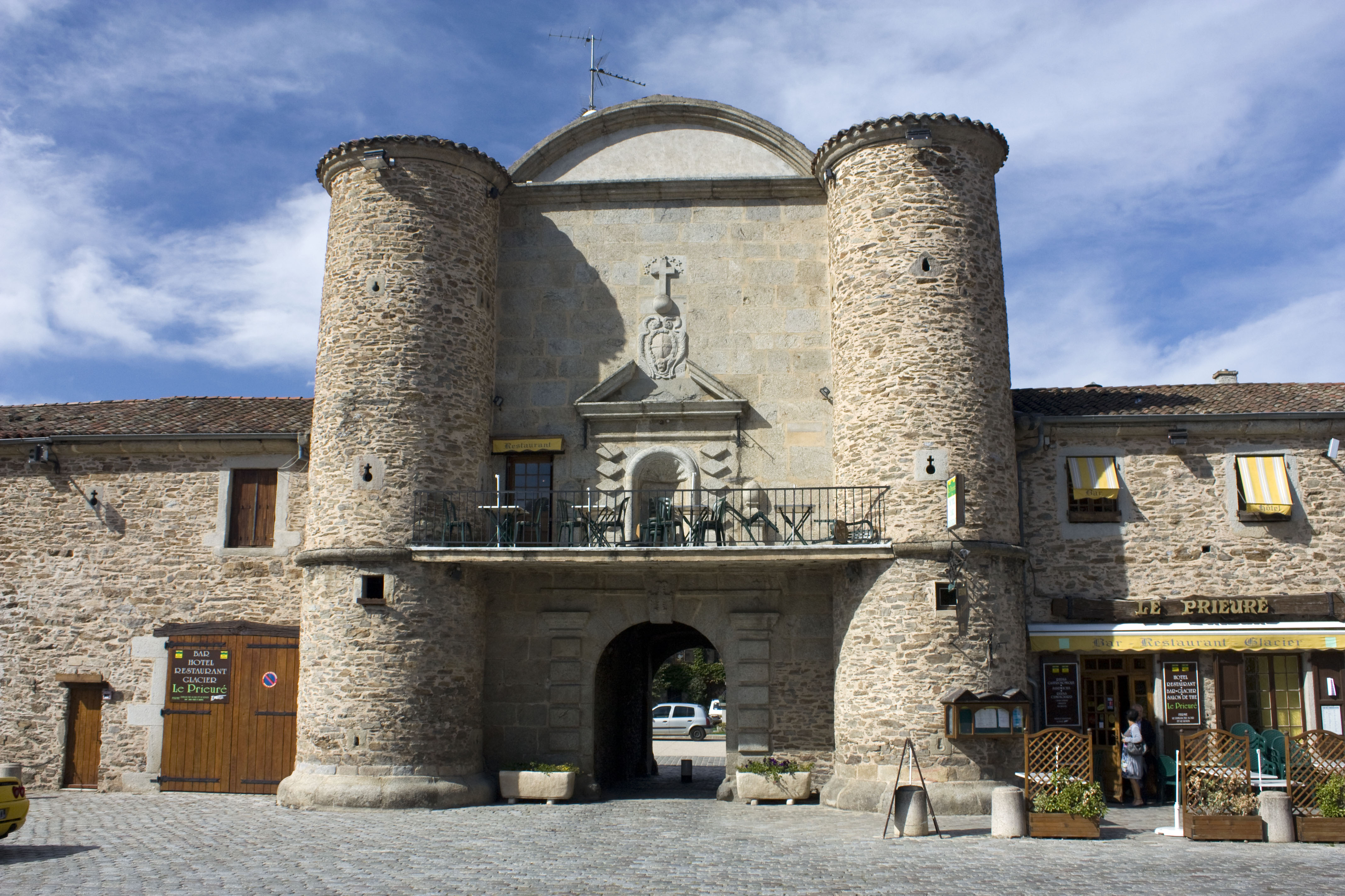 La porte de ville donne accès à la cour des Frères. Flanquée de deux tours médièvales, elle a été largement remaniée au XVII° siècle. A cette époque ont été ajouté un fronton de style renaissance orné des armoiries de l'ordre de la Grande Chartreuse : un globe surmonté d'une croix, et en dessous du «balcon» celles de la Chartreuse de Sainte-Croix : une croix dentelée cantonnée de fleurs de lys. Le balcon est un ajout récent et laid qui défigure l'harmonie de la porte de la ville